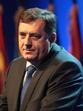 Միլորադ Դոդիք, 2010.